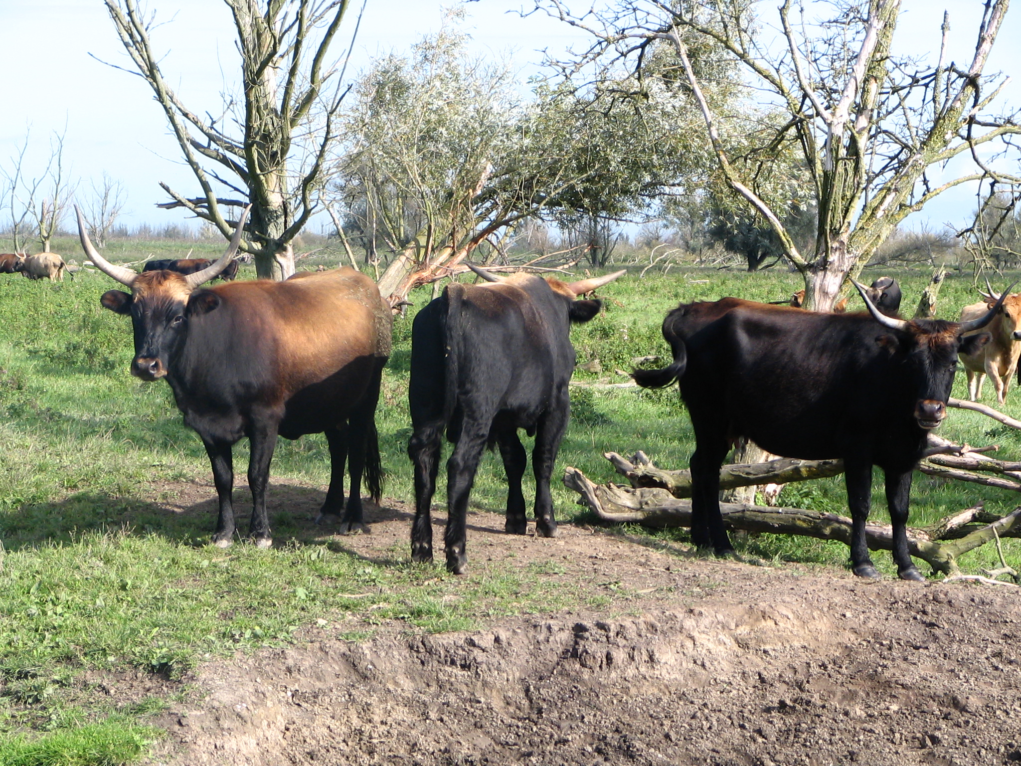 Eigen opname. GerardM A Heck cattle group, in Oostvaardersplassen, a nature reserve in Netherlands.